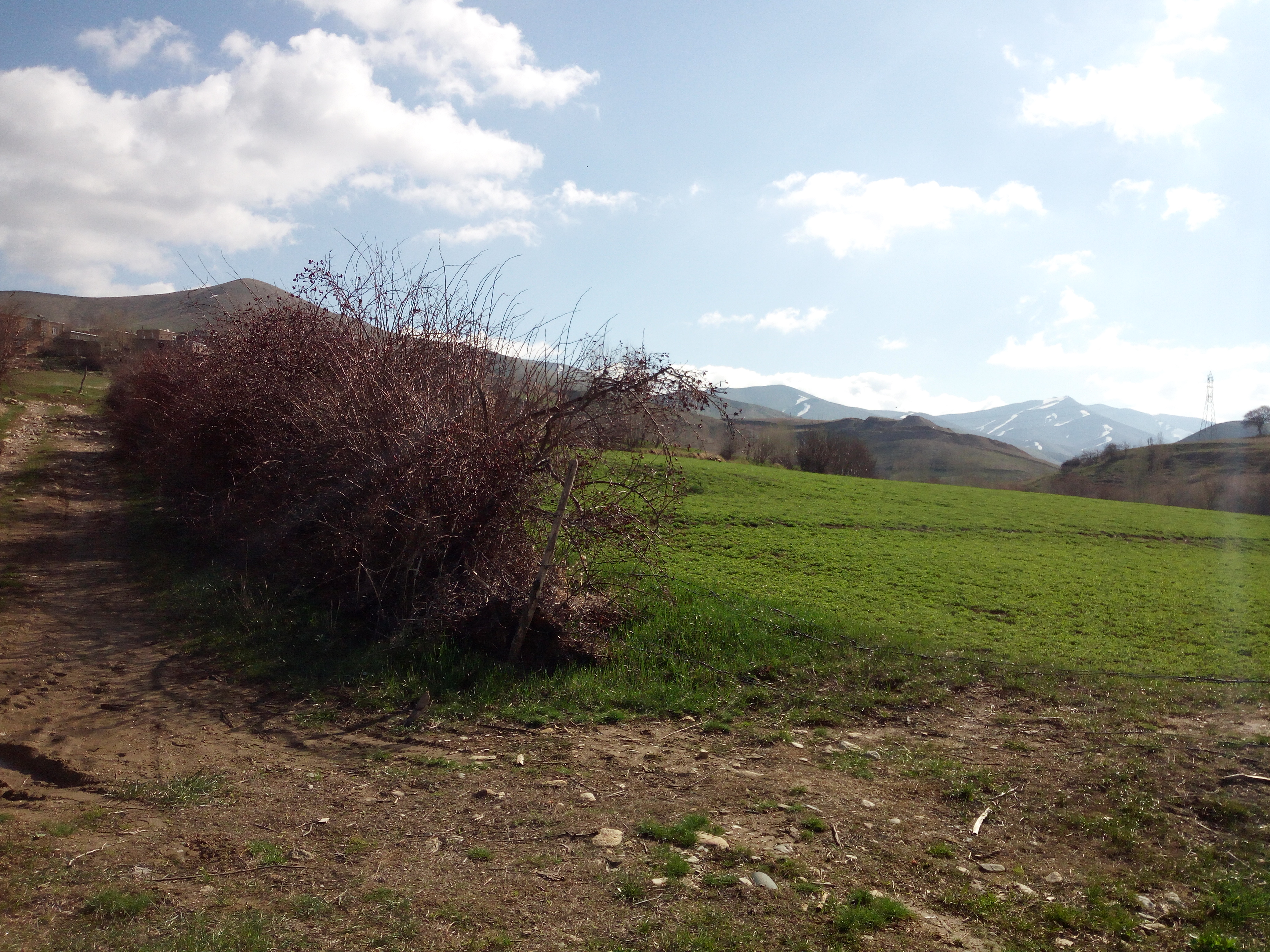 روستای دلنشین تموته